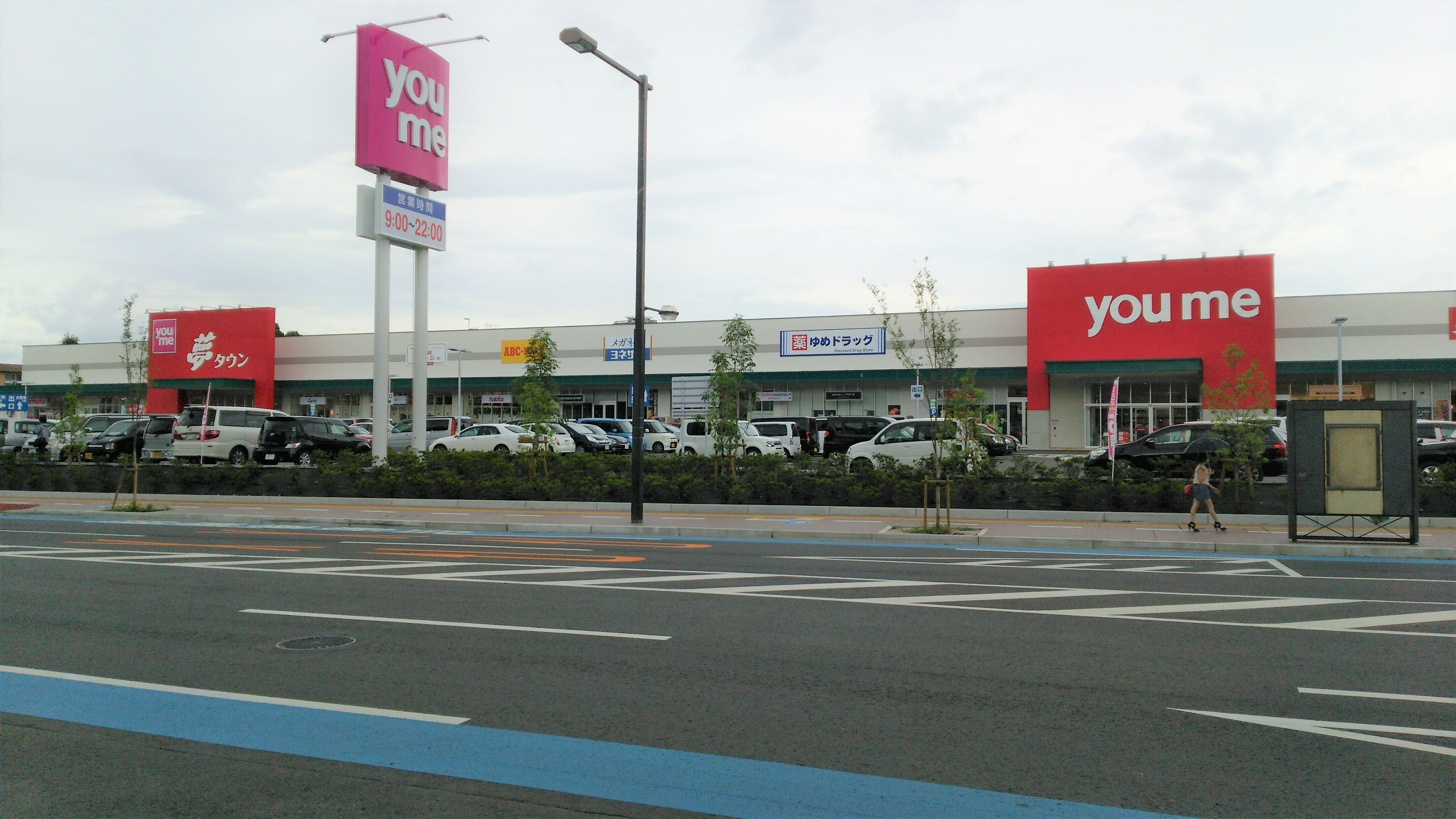 ゆめタウン大江 外観（2014年8月1日撮影）